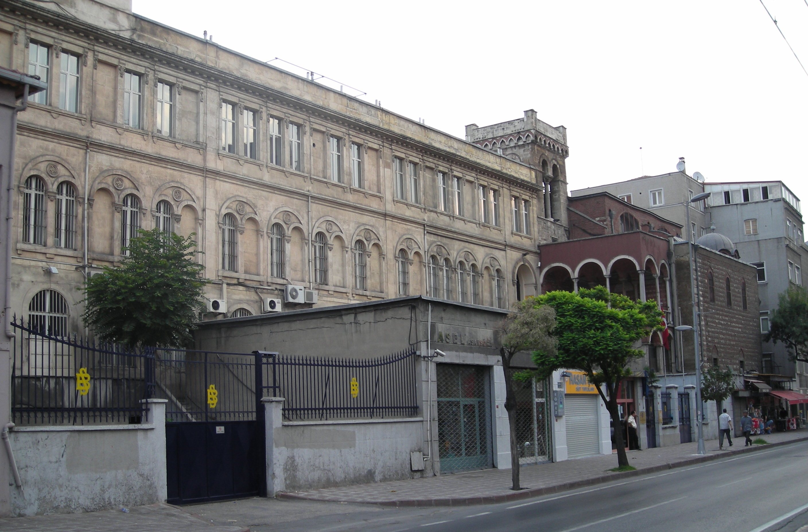 La façade du lycée Saint-Benoît à Galata, Istanbul, Turquie